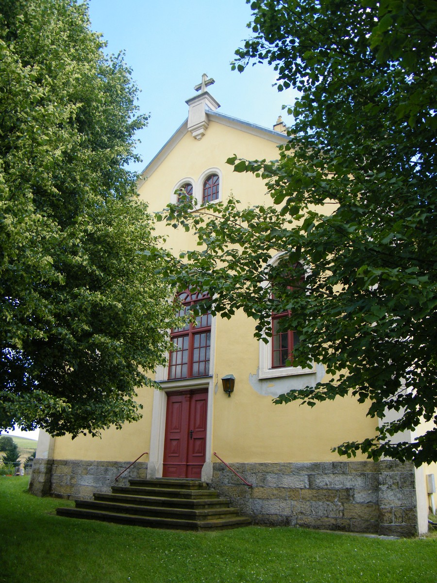 Engelkirche in Hinterhermsdorf